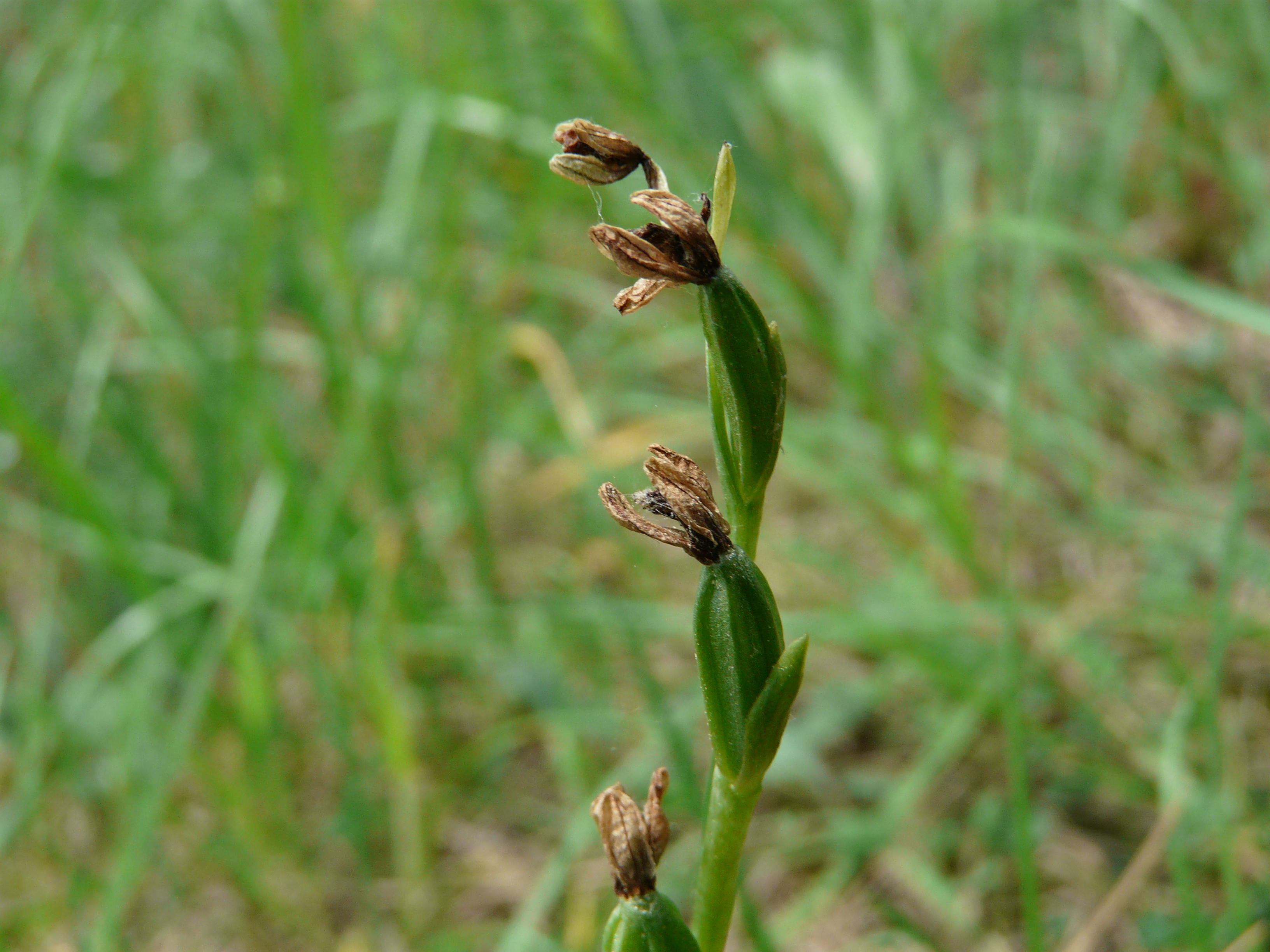 Fleurs fanées d'ophrys petite araignée ou ophrys litigieux (Ophrys araneola), Trélissac, Dordogne, France.